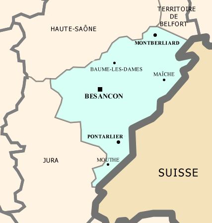 Carte politique du Doubs